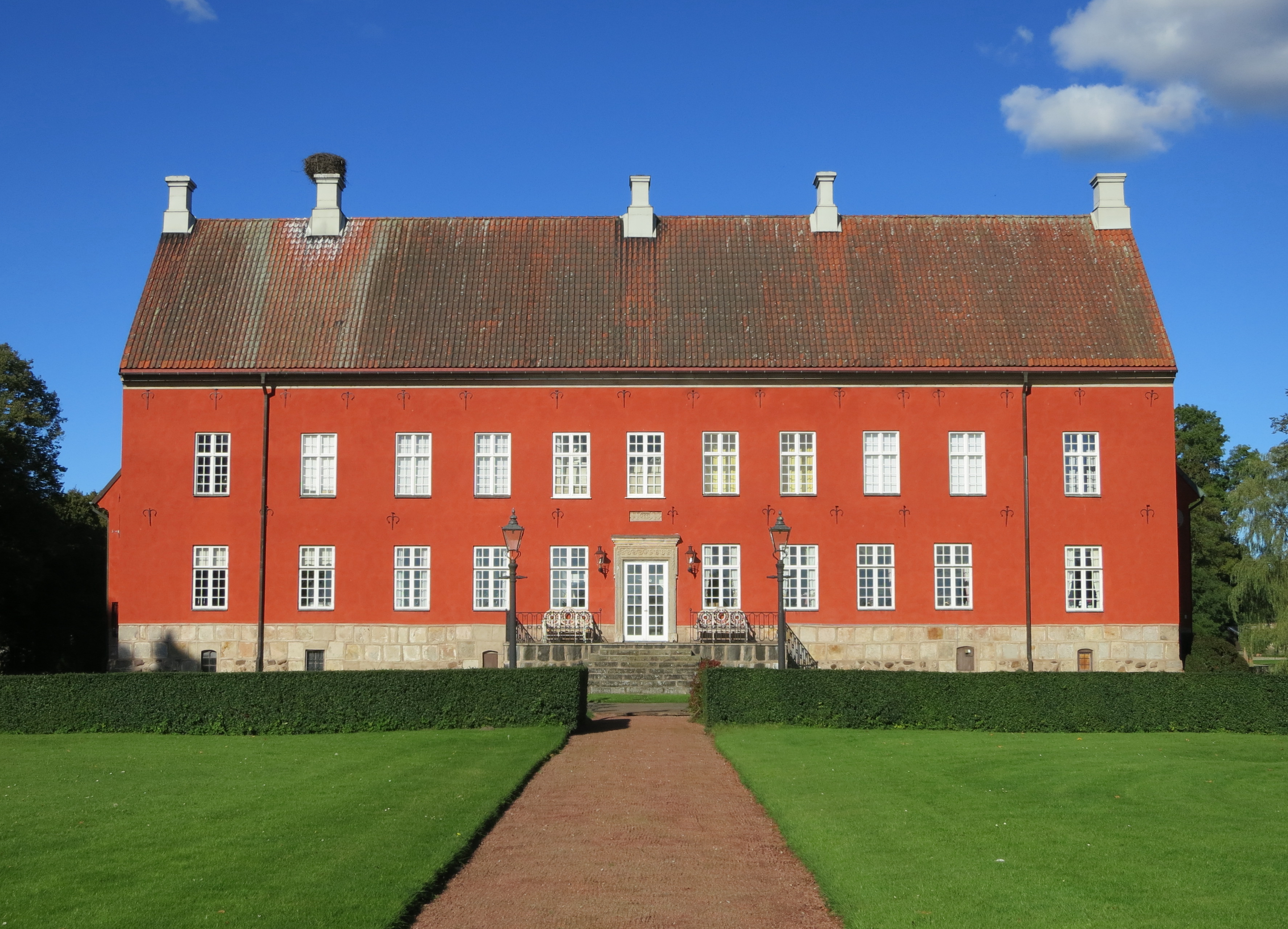 Viderups slott